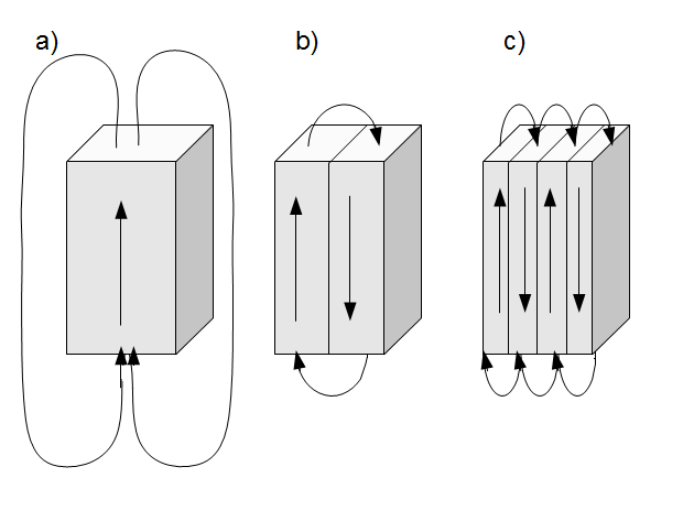 De quelle manière un matériaux ferromagnétique est subdivisé en plusieurs domaines.